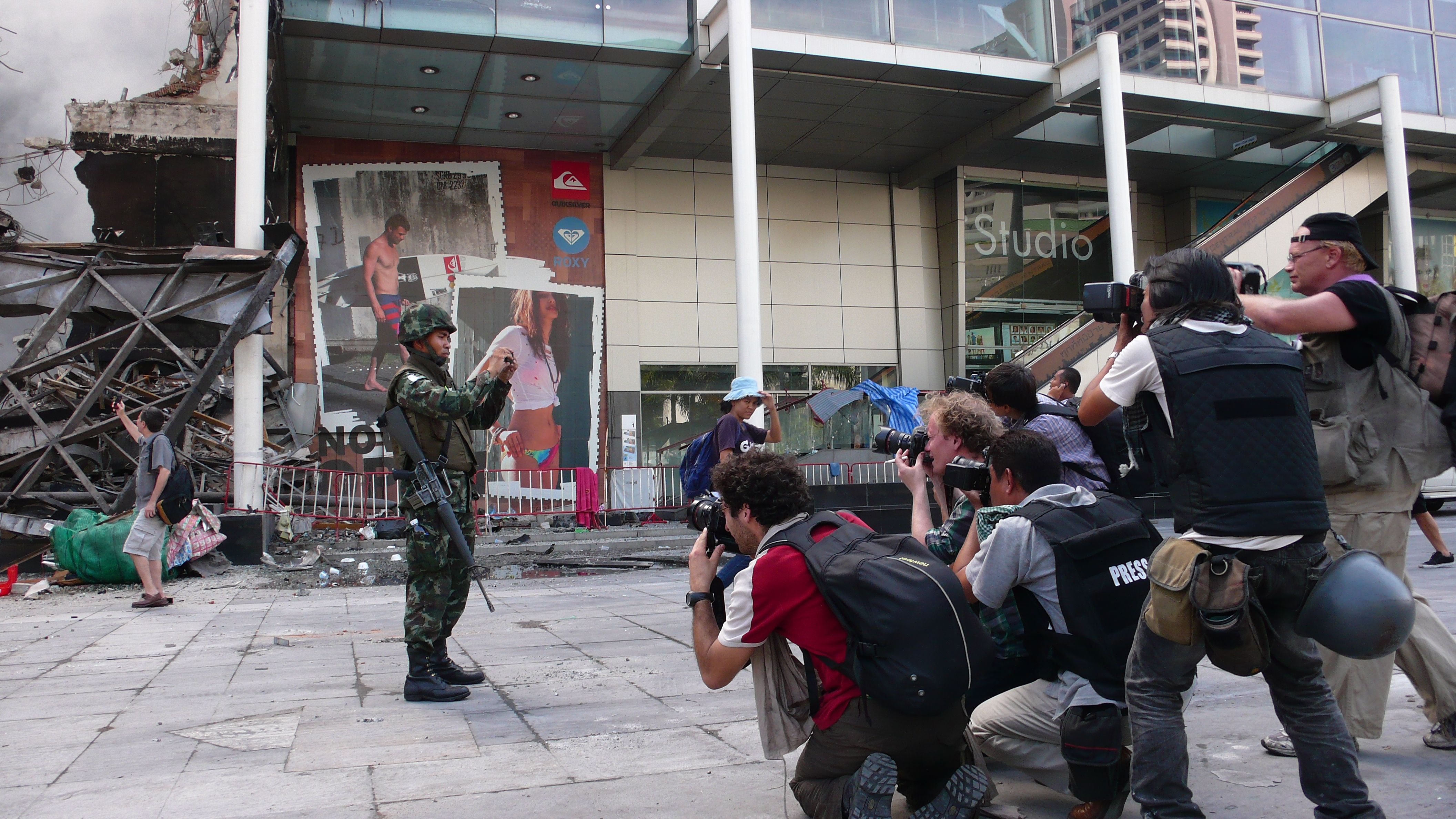 Periodistas tomando imágenes y fotografías el 20 de mayo de 2010, tras el asalto del ejército en Bangkok a las posiciones de los Camisas Rojas.